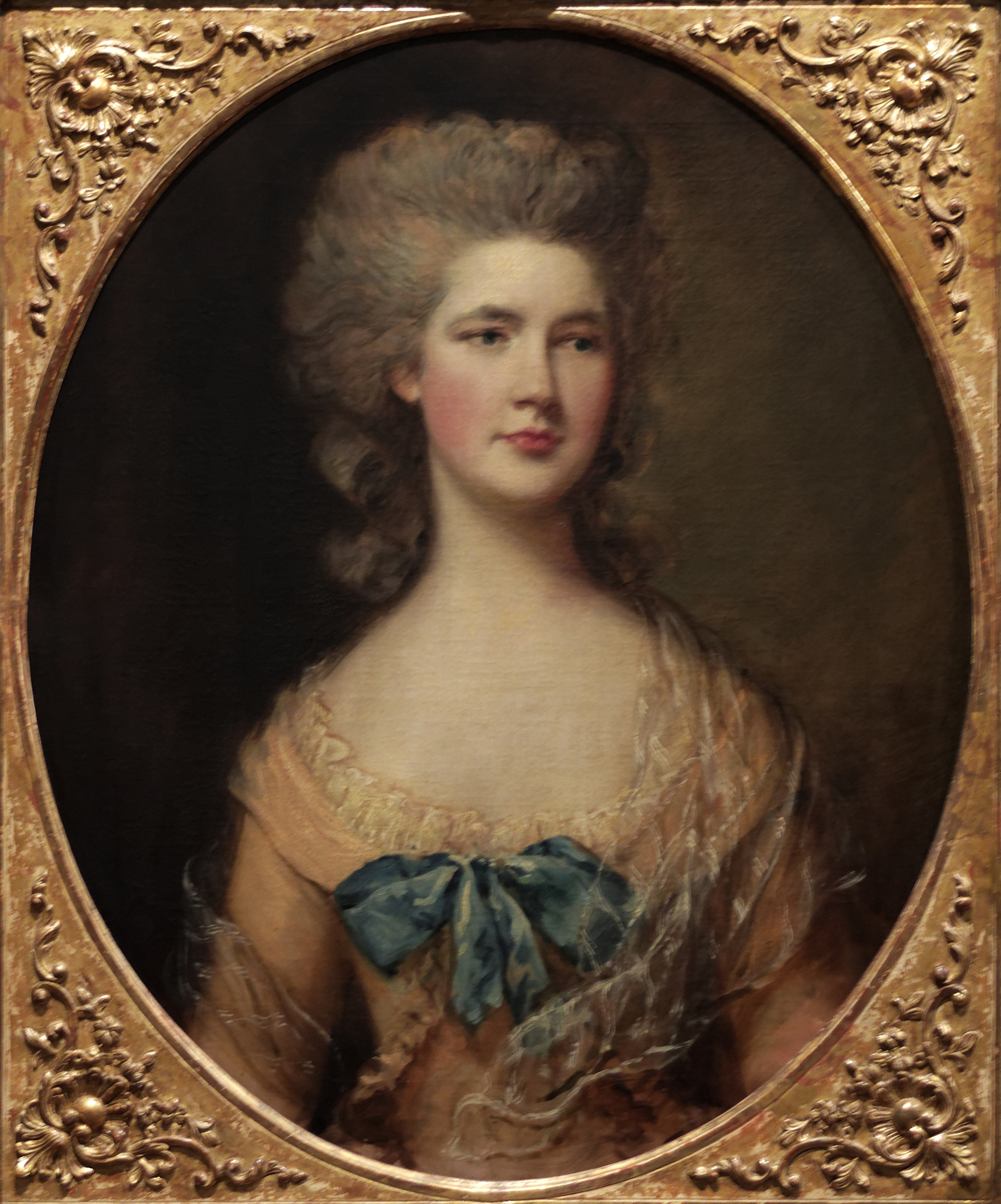 Miss Philadelphia Rowley, Angleterre ca1783. Exposée au musée Calouste Gulbenkian, Lisbonne.